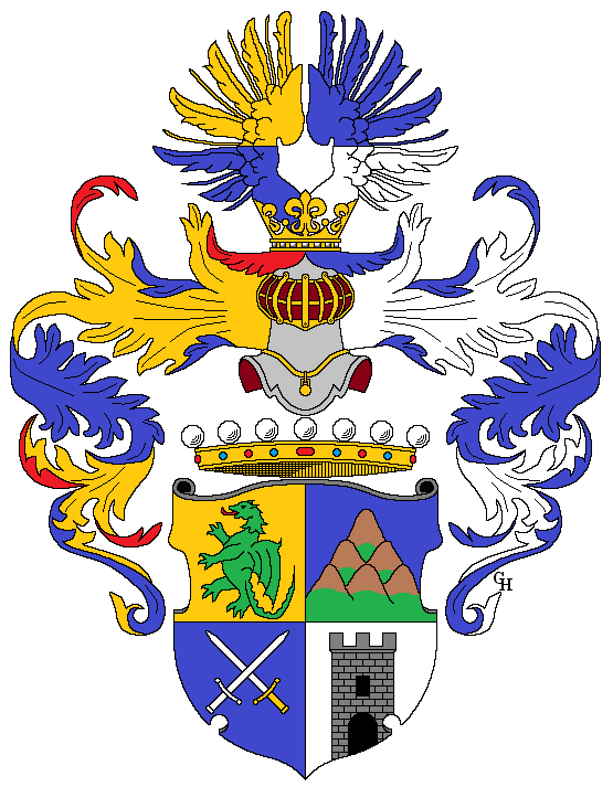 Wappen des österreichischen Majors Franz Kuhn von Kuhnenfeld (1817–1896), späteren k.u.k. Reichskriegsministers, verliehen anlässlich seiner Erhebung in den österreichischen Freiherrenstand 1852. Zeichnung von Gerd Hruška ( Für weitere Informationen zu dieser Standeserhebung siehe (